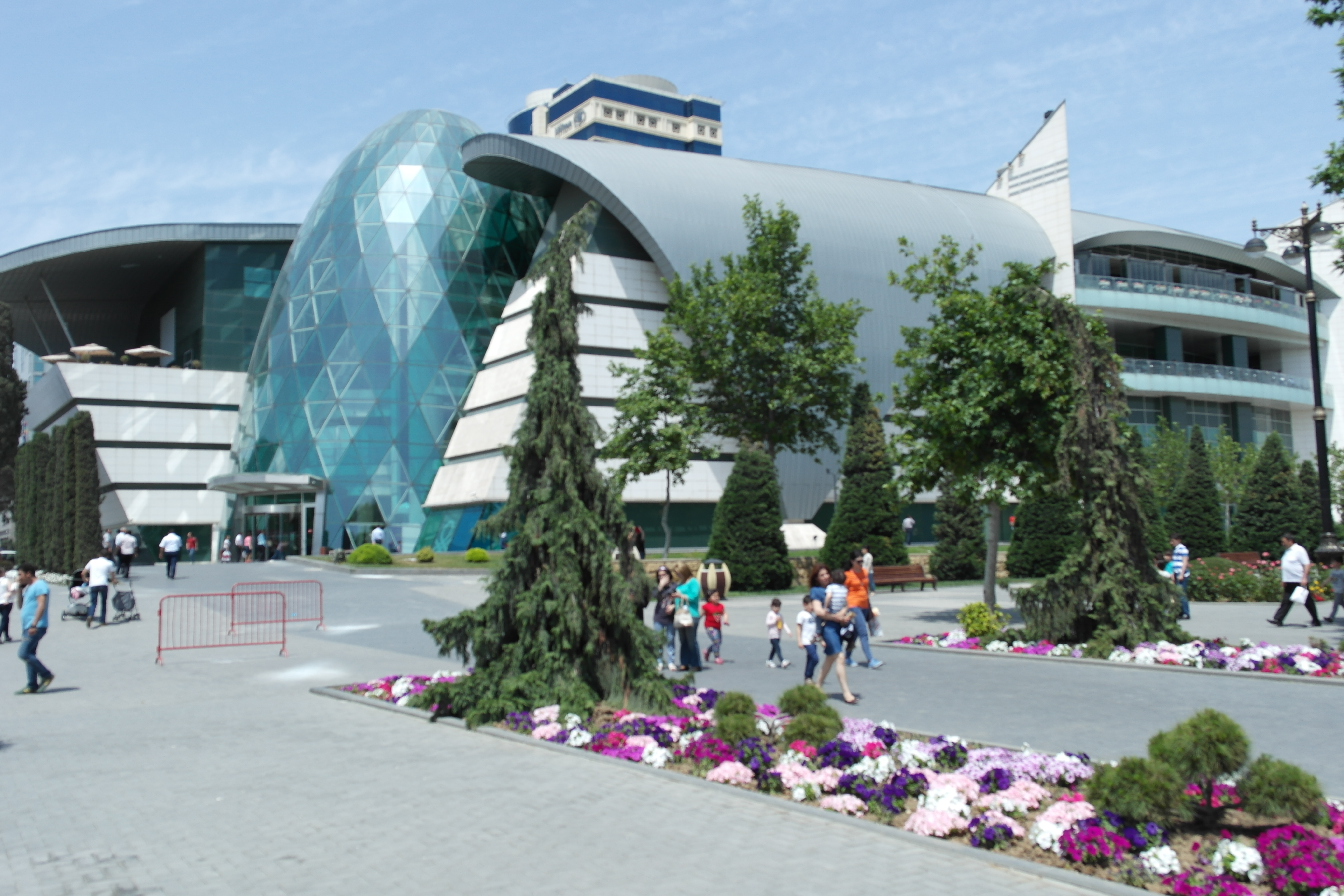 Sabayil, Baku, Azerbaijan